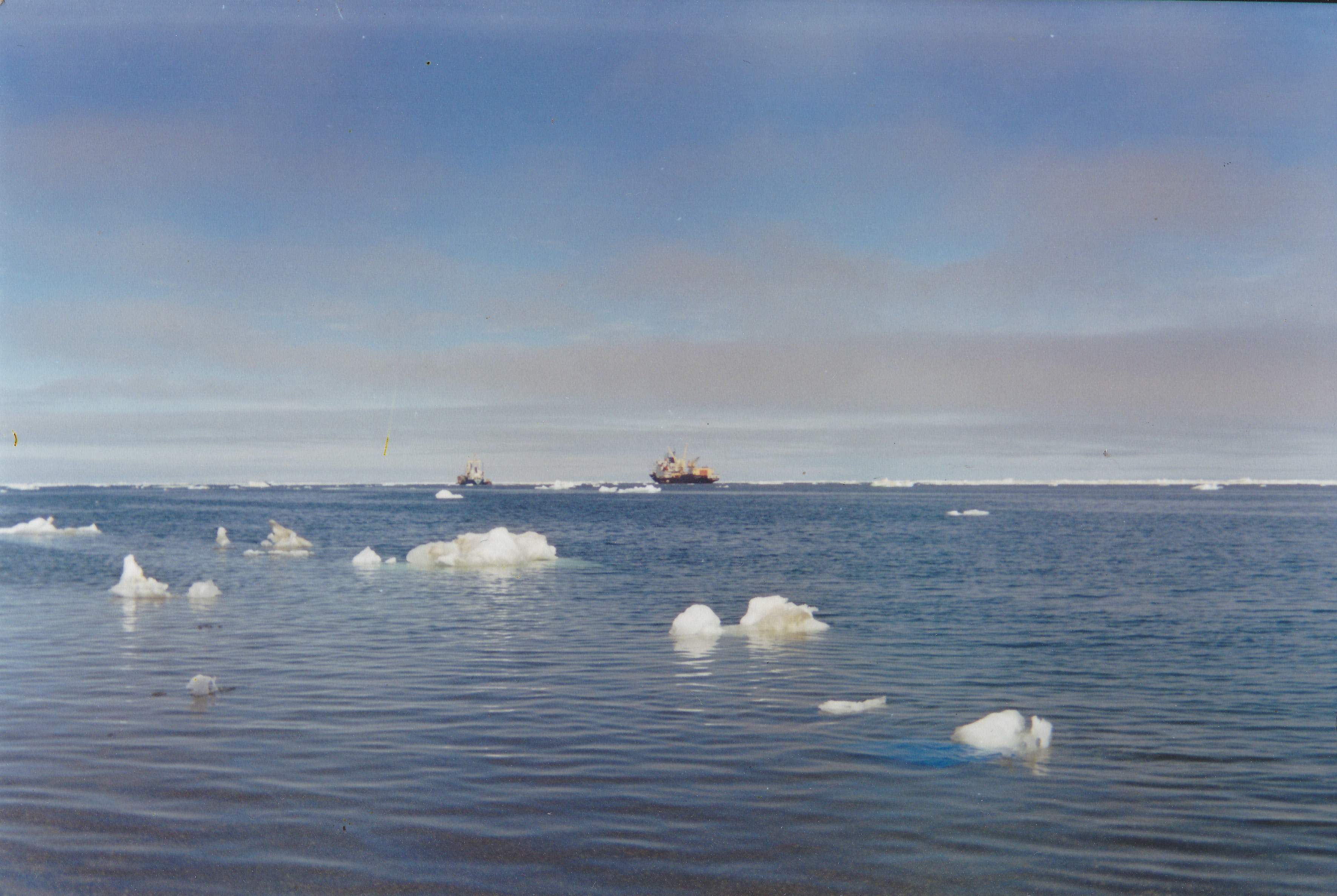 корабли на рейде у Мыса Шмидта